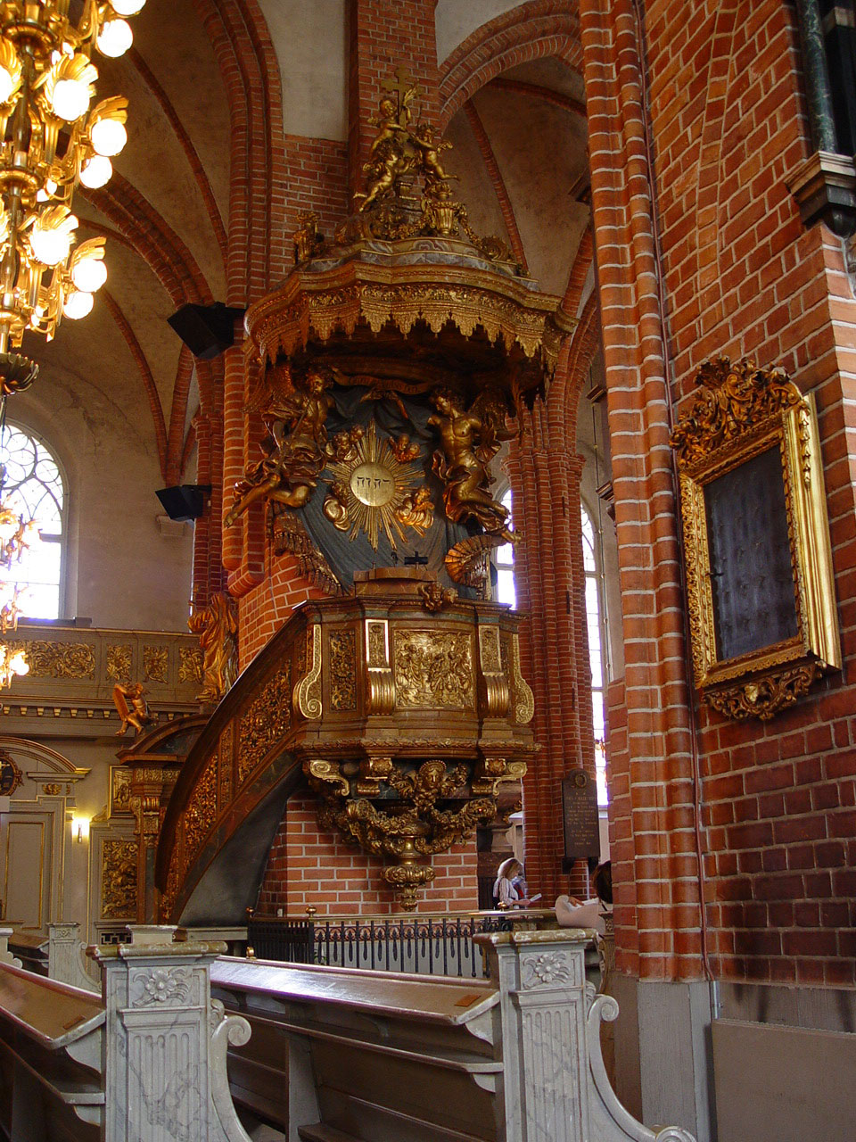 Storkyrkan in Stockholm, Gamla stan.